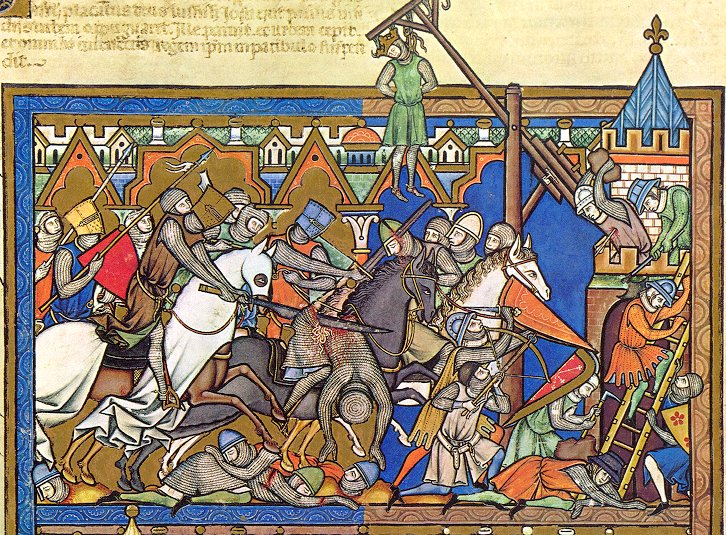 Miniatura de la Biblia Maciejowski